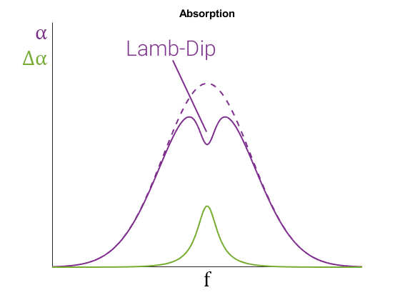 Absorption bei der Dopplerfreien Sättigungsspektroskopie ohne (gestrichelt) und mit (durchgezogen) Pump-Strahl. In Grün die Absorptionsdifferenz.